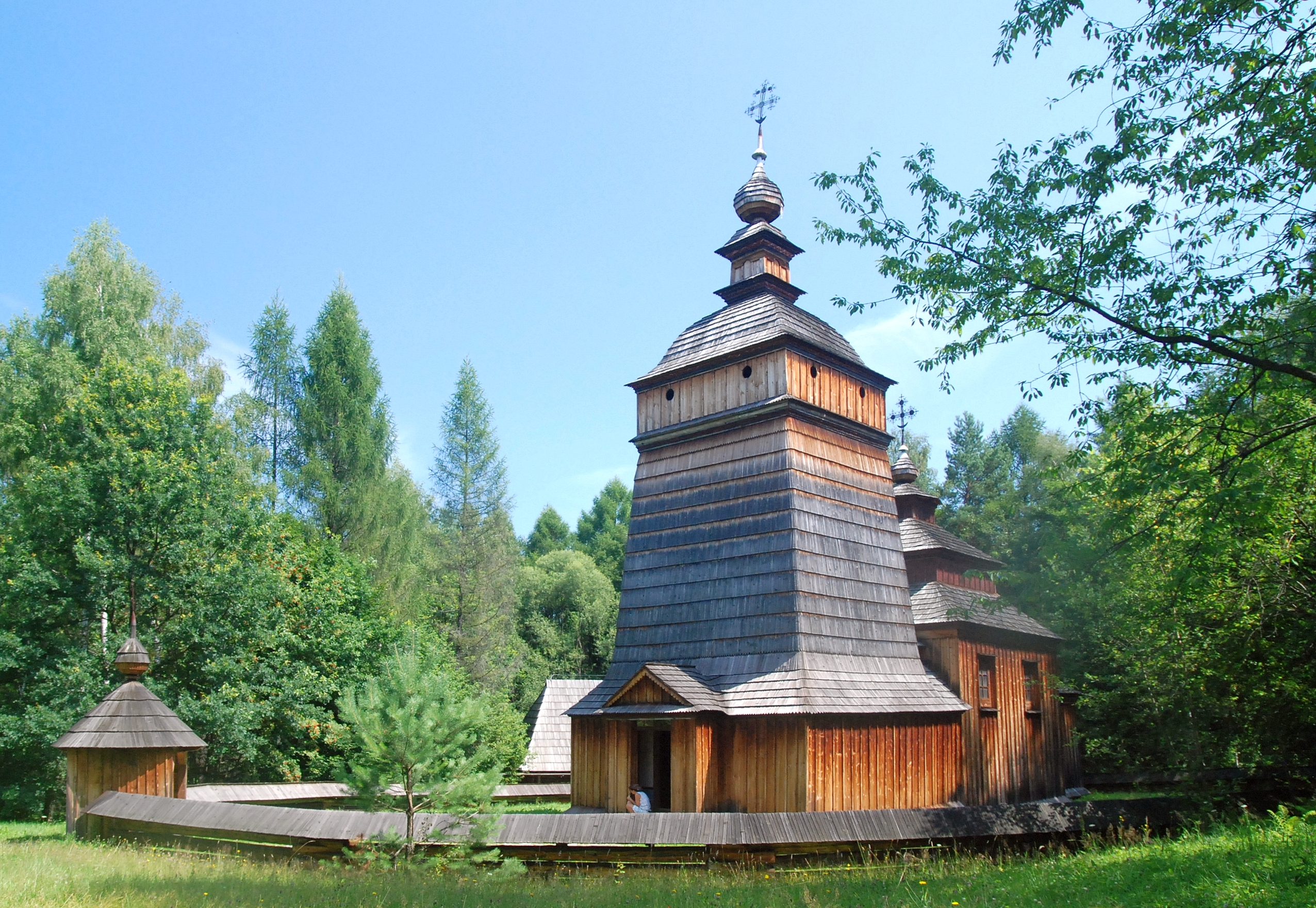 miasto Nowy Sącz